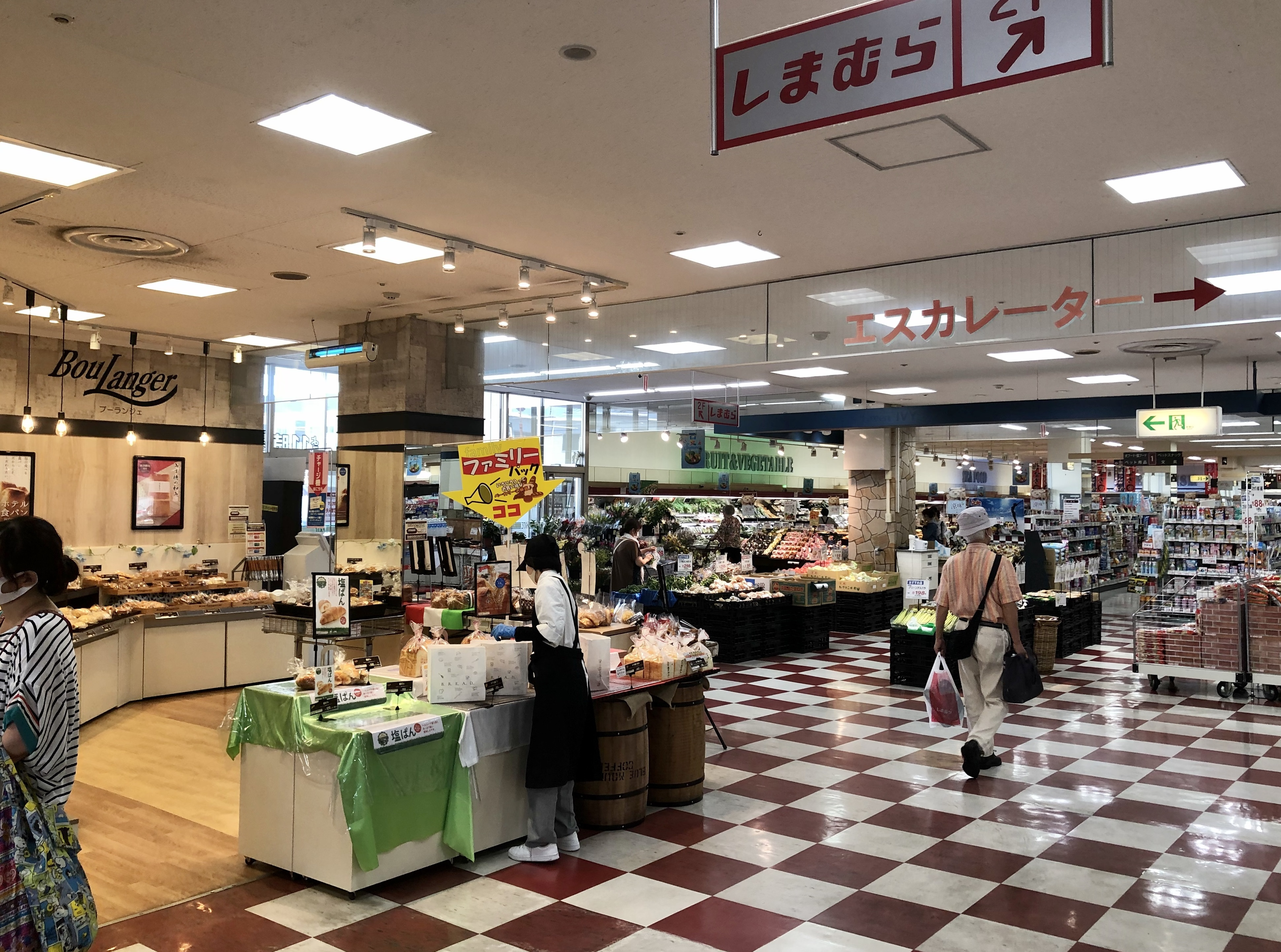 ヤマナカ アルテ岡崎北店（岡崎市井ノ口新町）